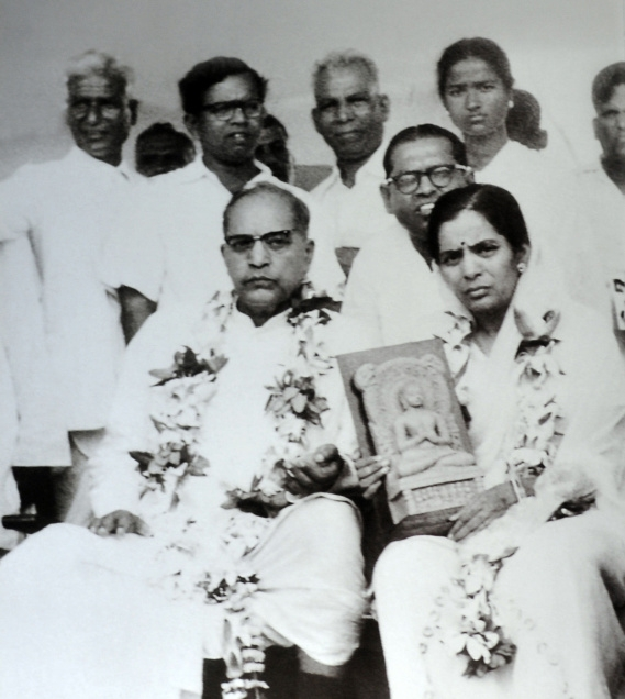 नागपूरच्या धम्मदीक्षा सोहळ्यामध्ये डॉ. बाबासाहेब आंबेडकर हातात बुद्ध मुर्ती धरलेल्या आपल्या पत्नी डॉ. सविता आंबेडकर समवेत. १४ ऑक्टोबर १९५६